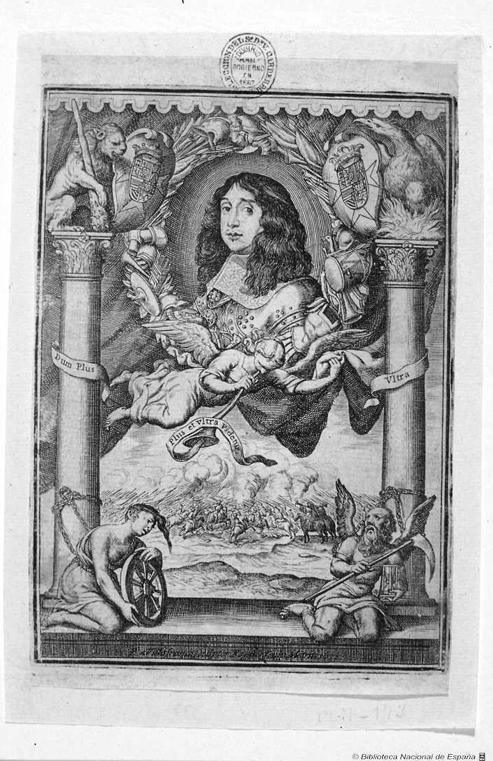 Grabado alegórico de don Juan José de Austria, hijo de Felipe IV de España